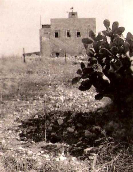 מראה הבית בג\'וערה בו השתכנו החברים ביום עלייתם.הבית משמש עד היום כמוזיאון לתלדות ההגנה בג\'וערה.